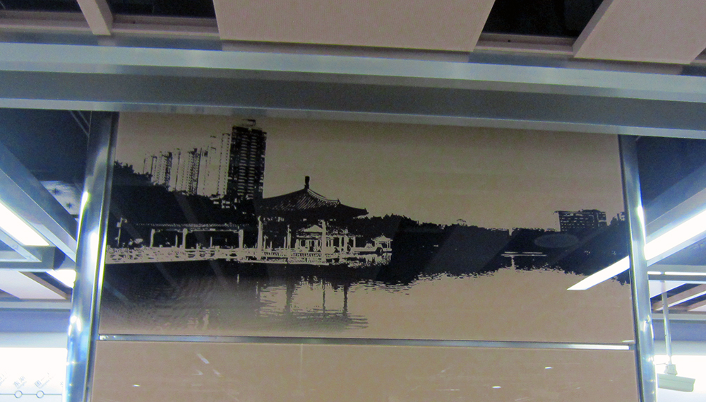 如意坊站柱面裝飾